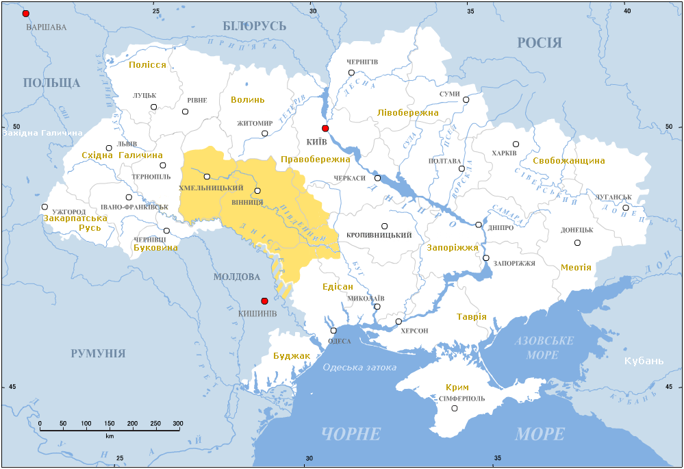 Поділля